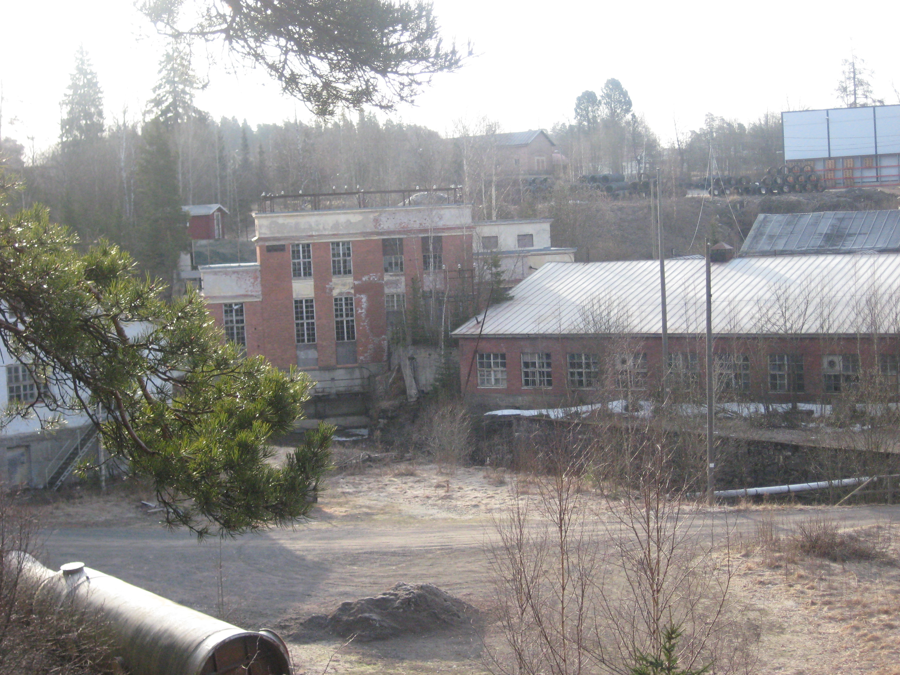 Jokioisten voimalaitos joen puolelta